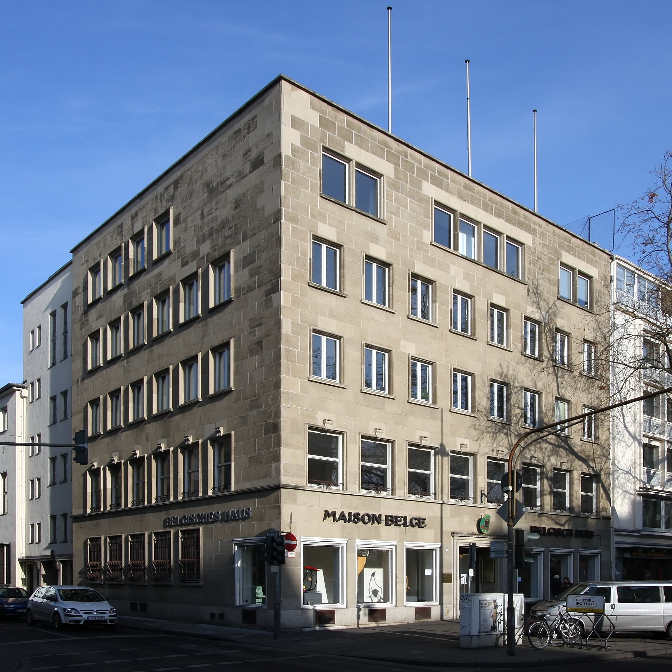 Belgisches Haus, Köln. Bis Ende Mai 2015 Sitz des belgischen Generalkonsuls